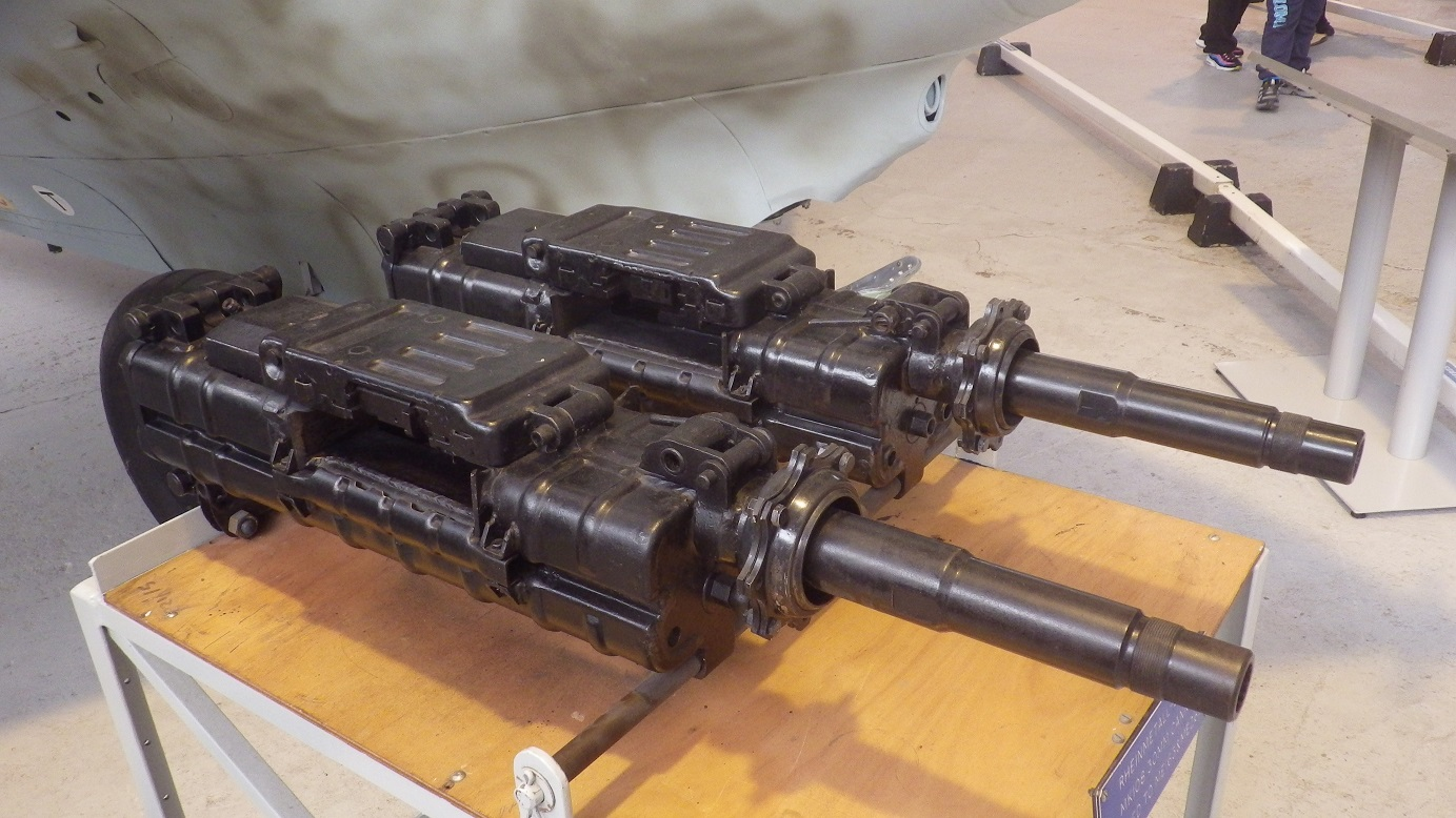 Rheinmetall-Borsig MK 108 RAF Museum Cosford 2015年2月28日撮影